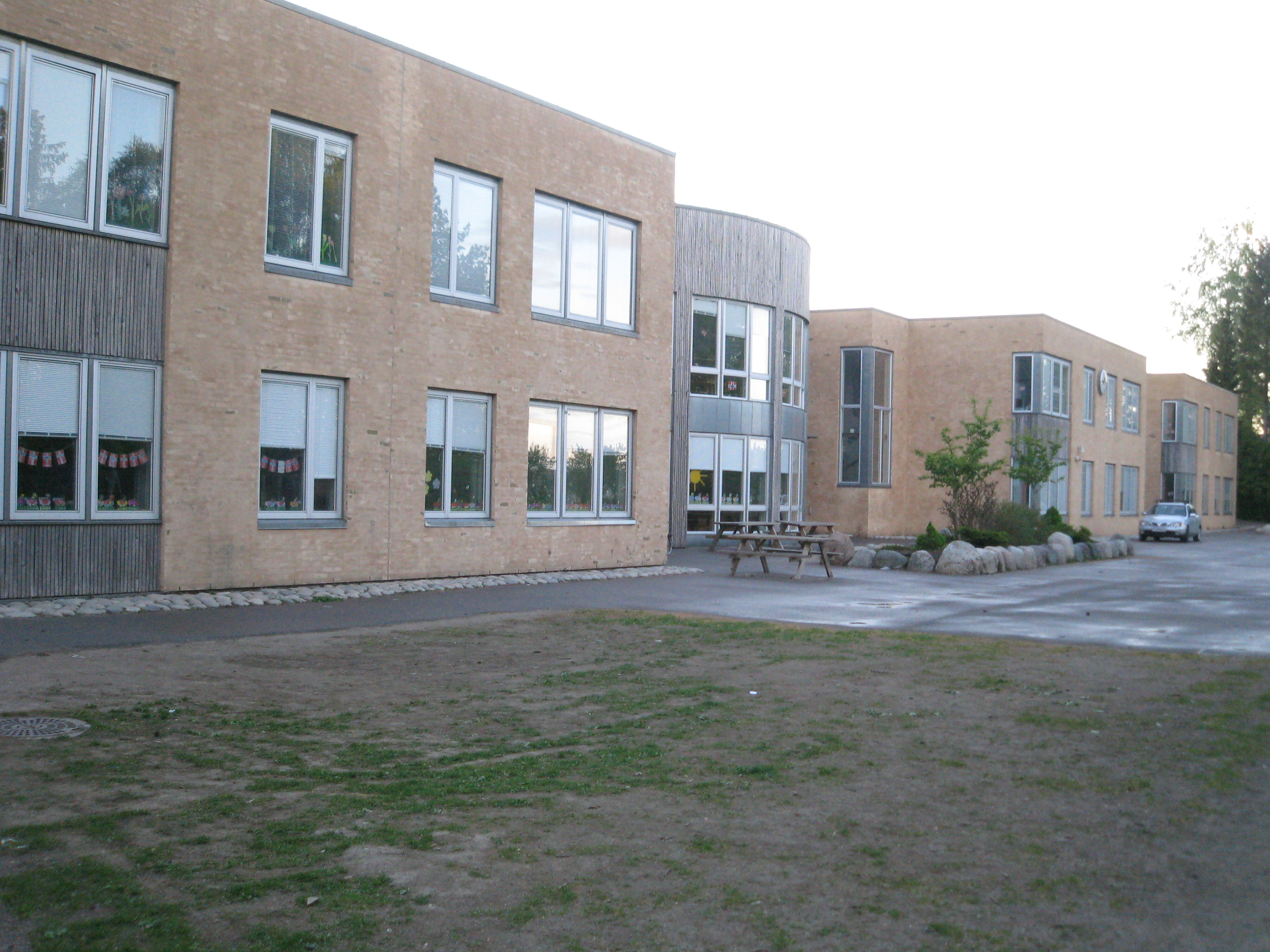 Ringshaug skole - fra lekeplassen